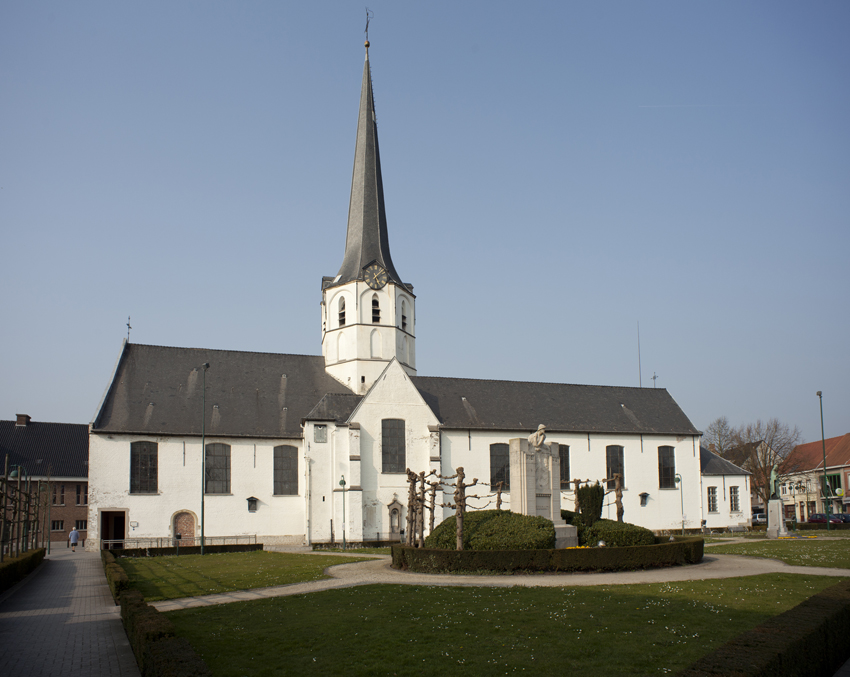 Bijgenaamd de Slense Noalde (De Sleidingse Naald)